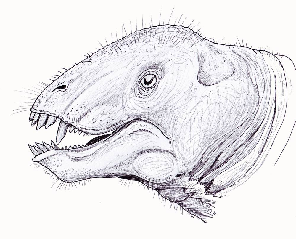 Tapinocaninus_pamelae_head